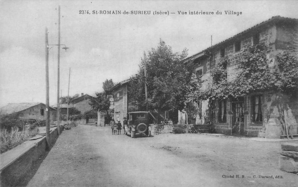 Saint-Romain-de-Surieu (Isère) vue intérieure du village.